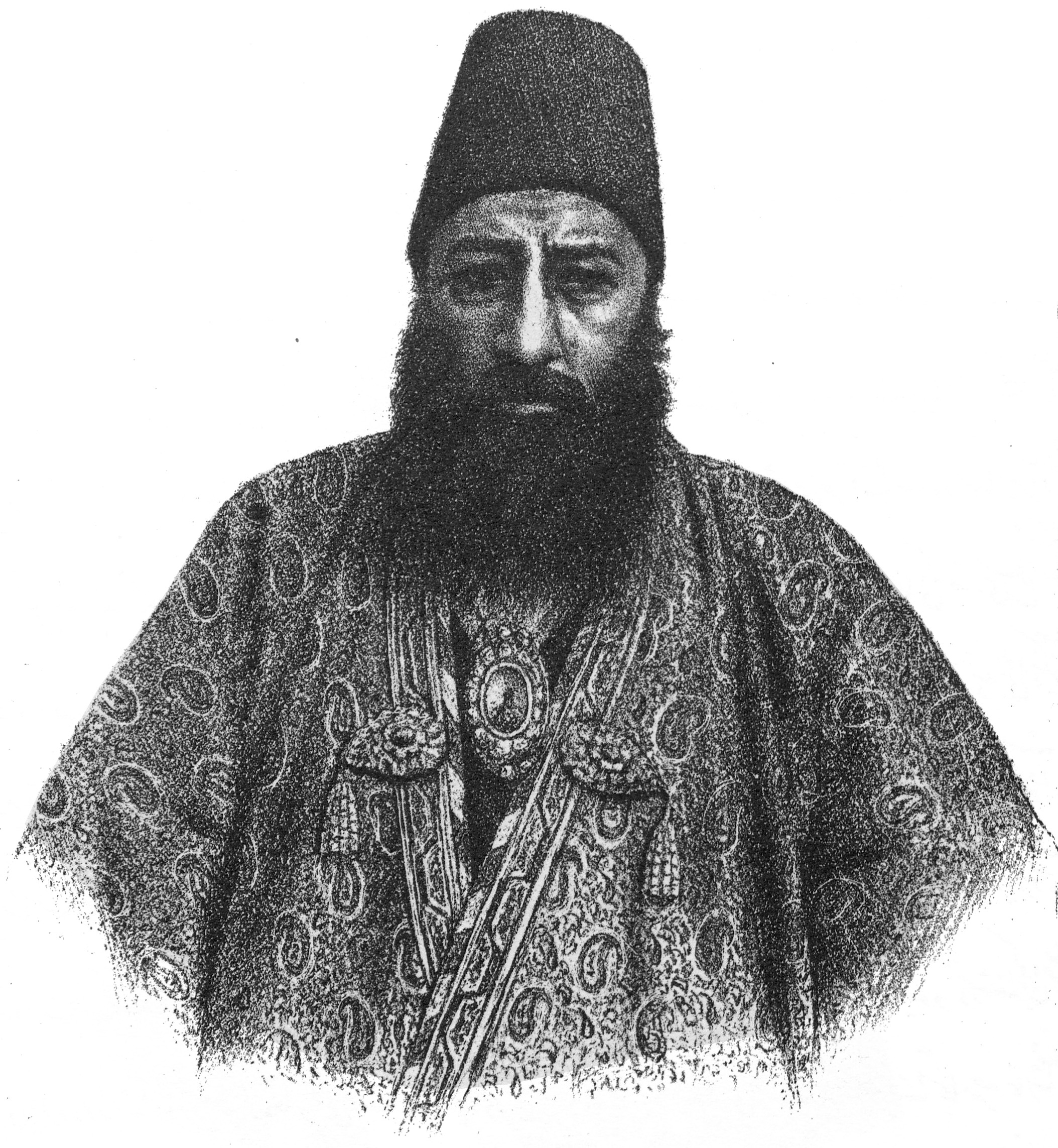 عباس میرزا قوام‌الدوله